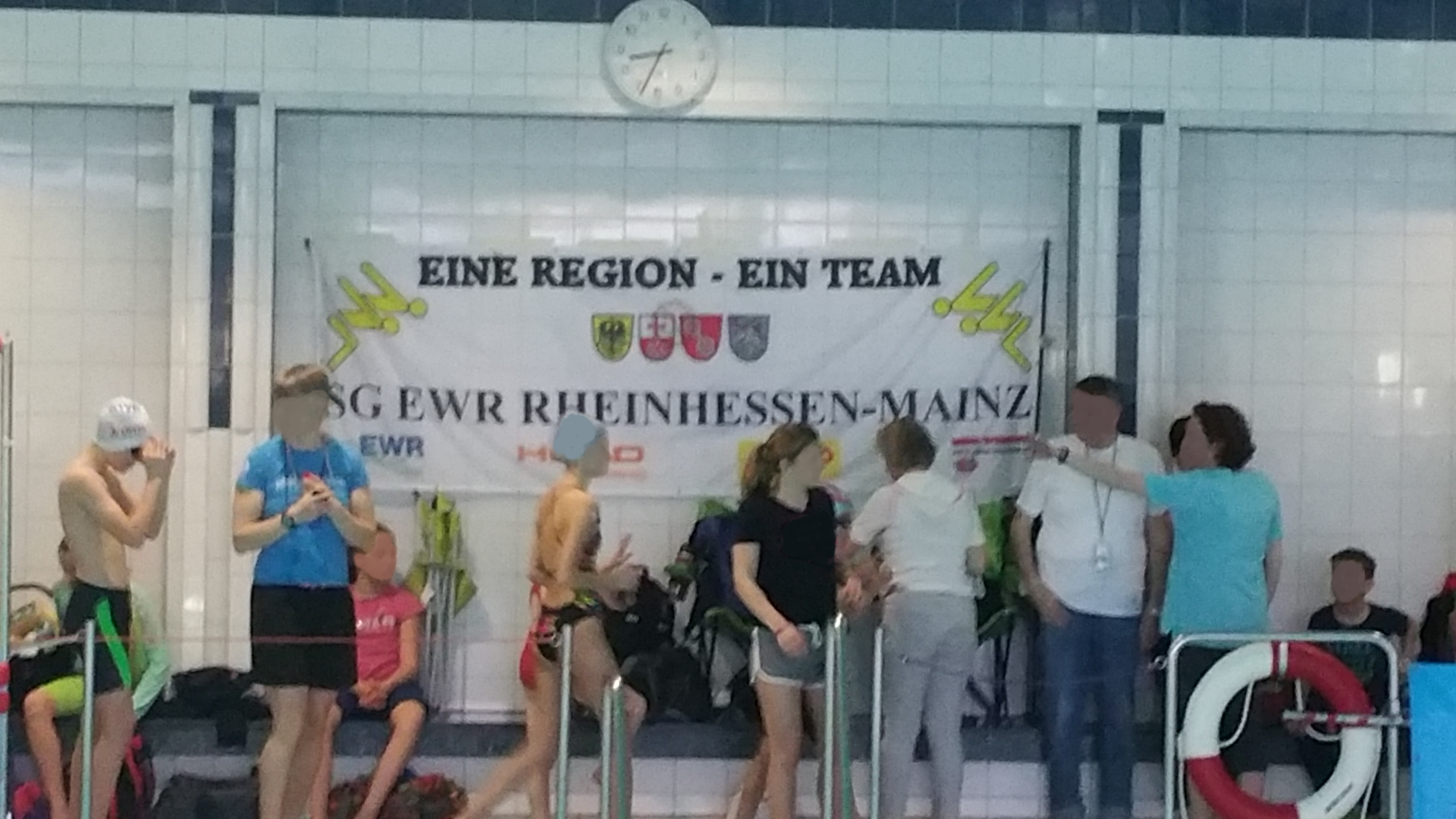 Eine Region - ein Team! Banner beim Wettkampf